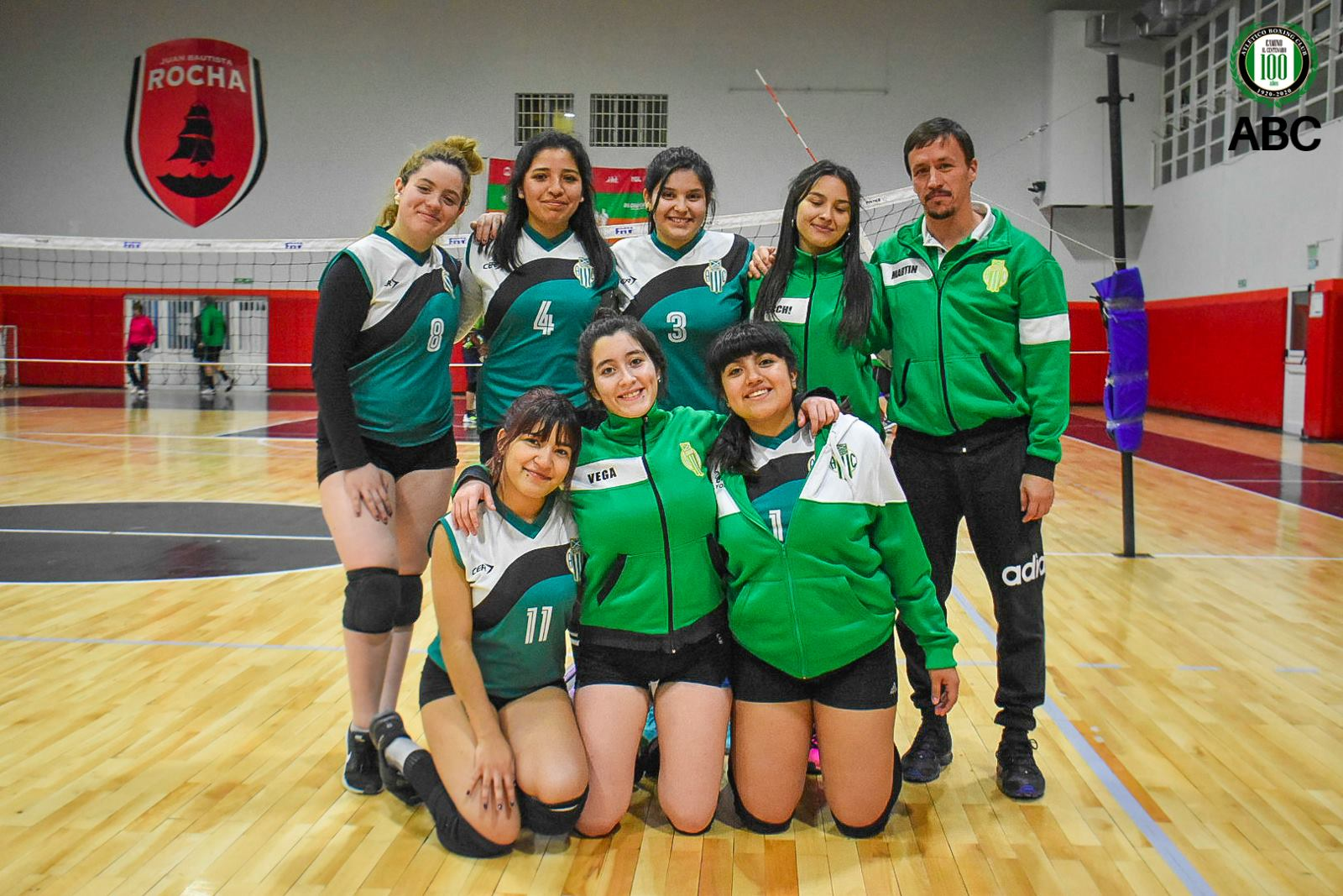 ABC VOLEY